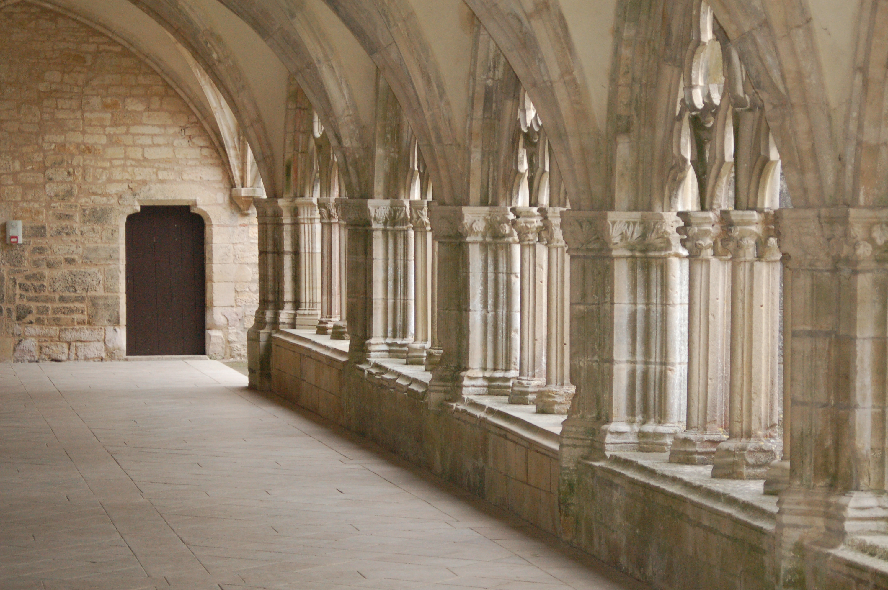 Cloître de l'abbaye de Noirlac (Bruère-Allichamps, Centre, France)